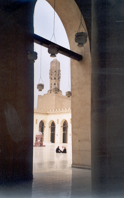 Cours de la Mosquée Al-Hakim Février 2005 par Michel Benoist Licensing Catégorie:Le Caire Catégorie:Fatimides